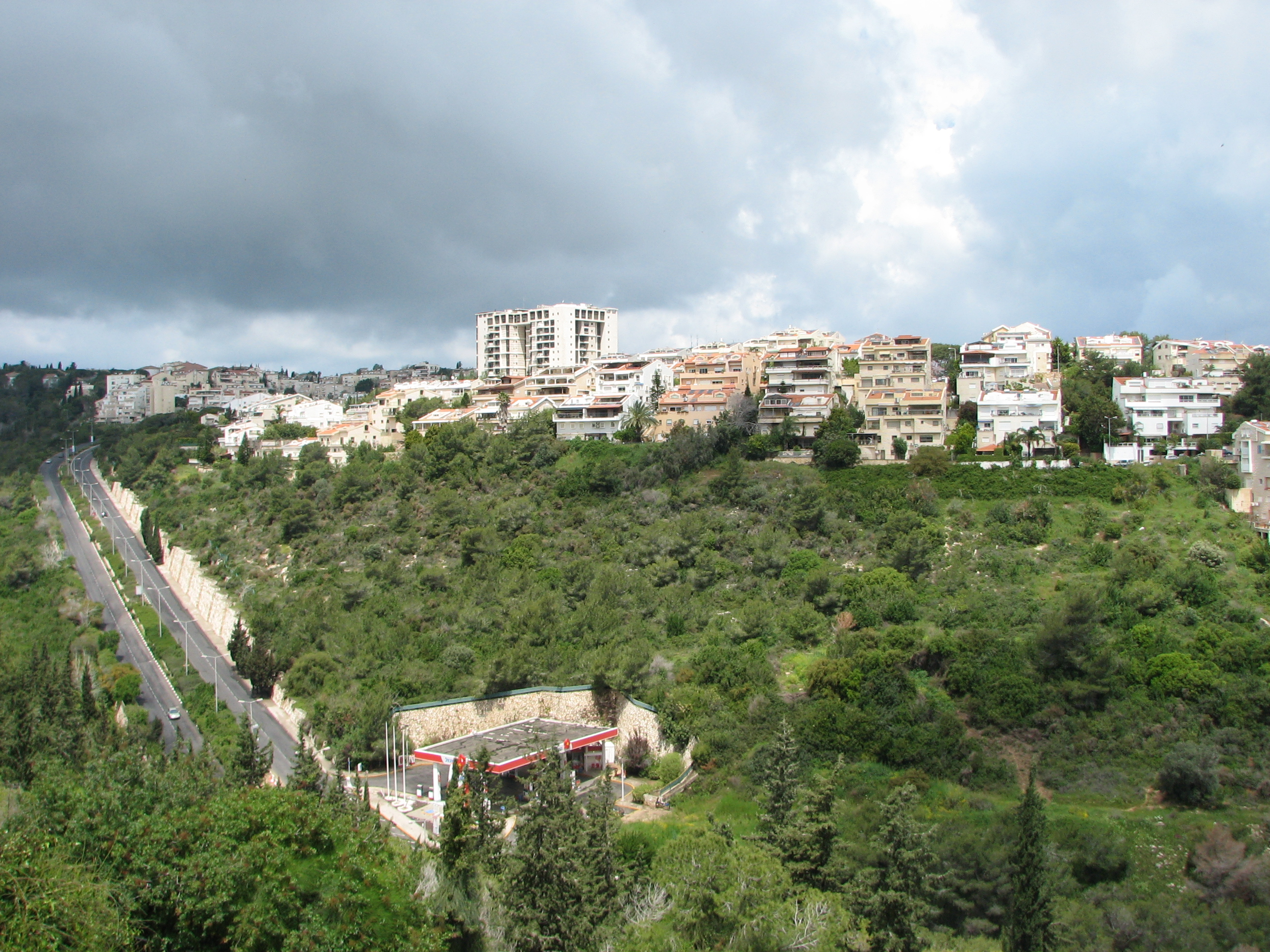 Vardiya, Neighbourhoods of Haifa , Haifa Israel ורדיה, השכונה יושבת על גבעה רמה בין נחל הגיבורים (ואדי רושמיה) לנחל תן שבכרמל, בין רוממה והדר. בחיפה תצפית על ורדיה ורחוב ראש מיה משכוהת רוממה הישנה